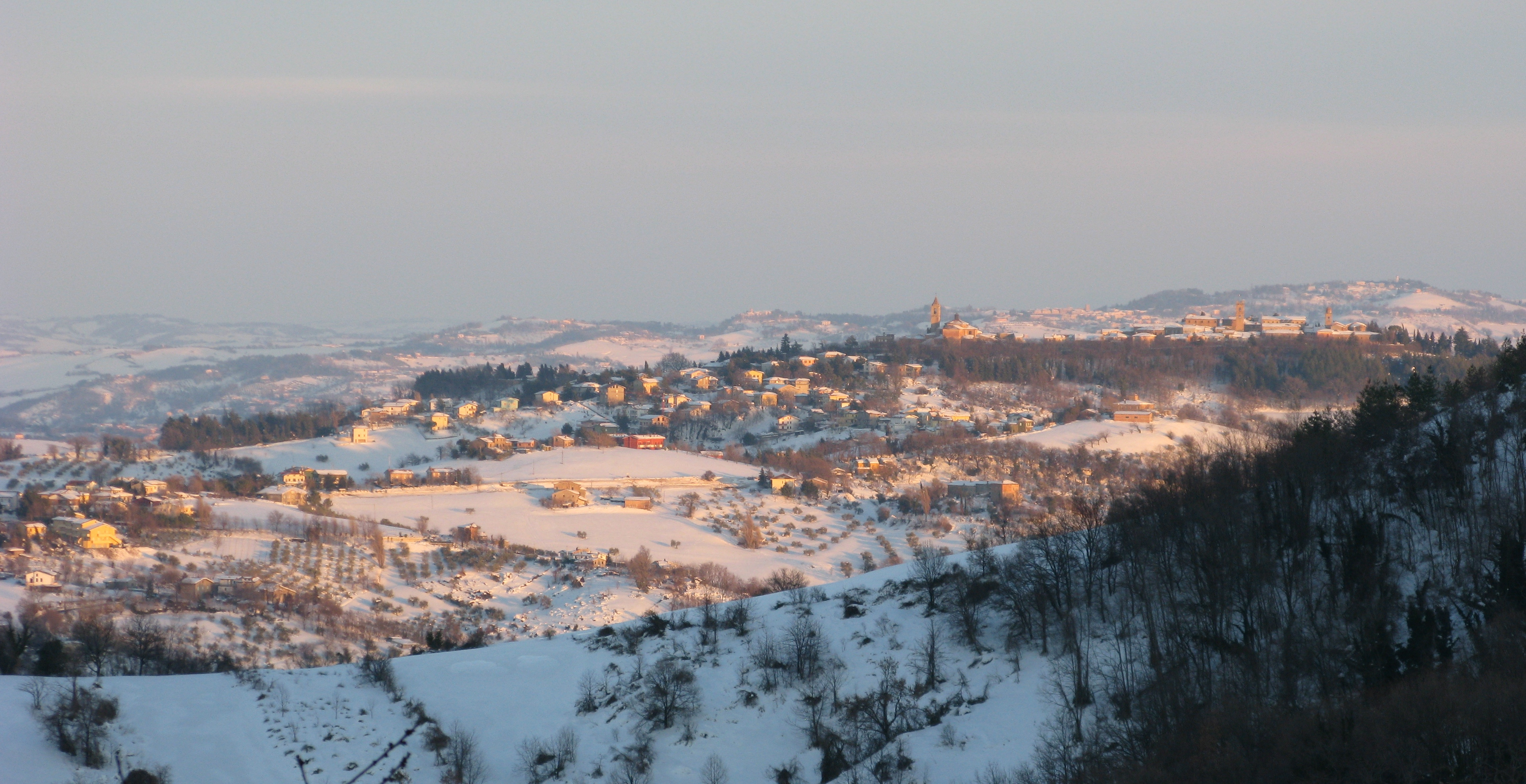 Panorama di Saludecio con la neve, 2012.